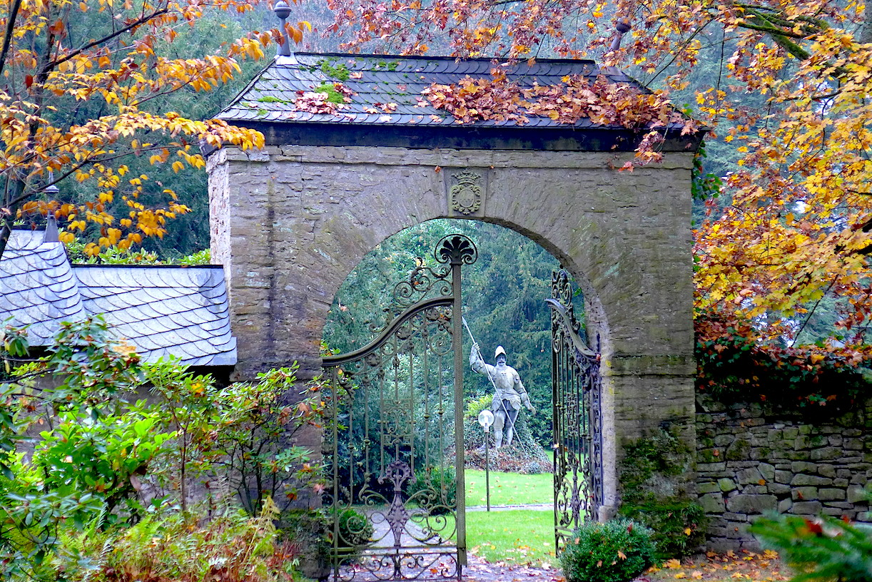 "Тропа Клинка" - туристский маркированнный маршрут вокруг немецкого города Золинген (Северный Рейн-Вестфалия). Восьмой этап: между Вуппером и Иттером. 7.2 км.